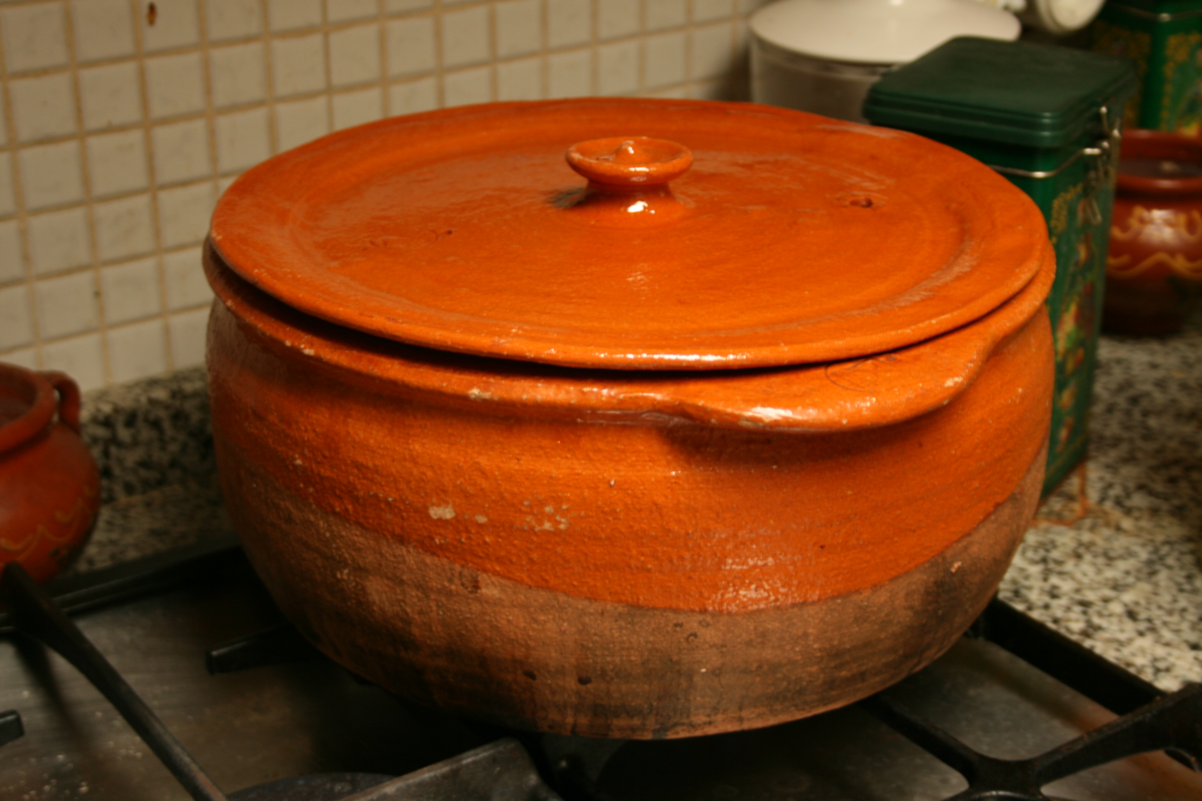 Olla de barro de fondo ancho